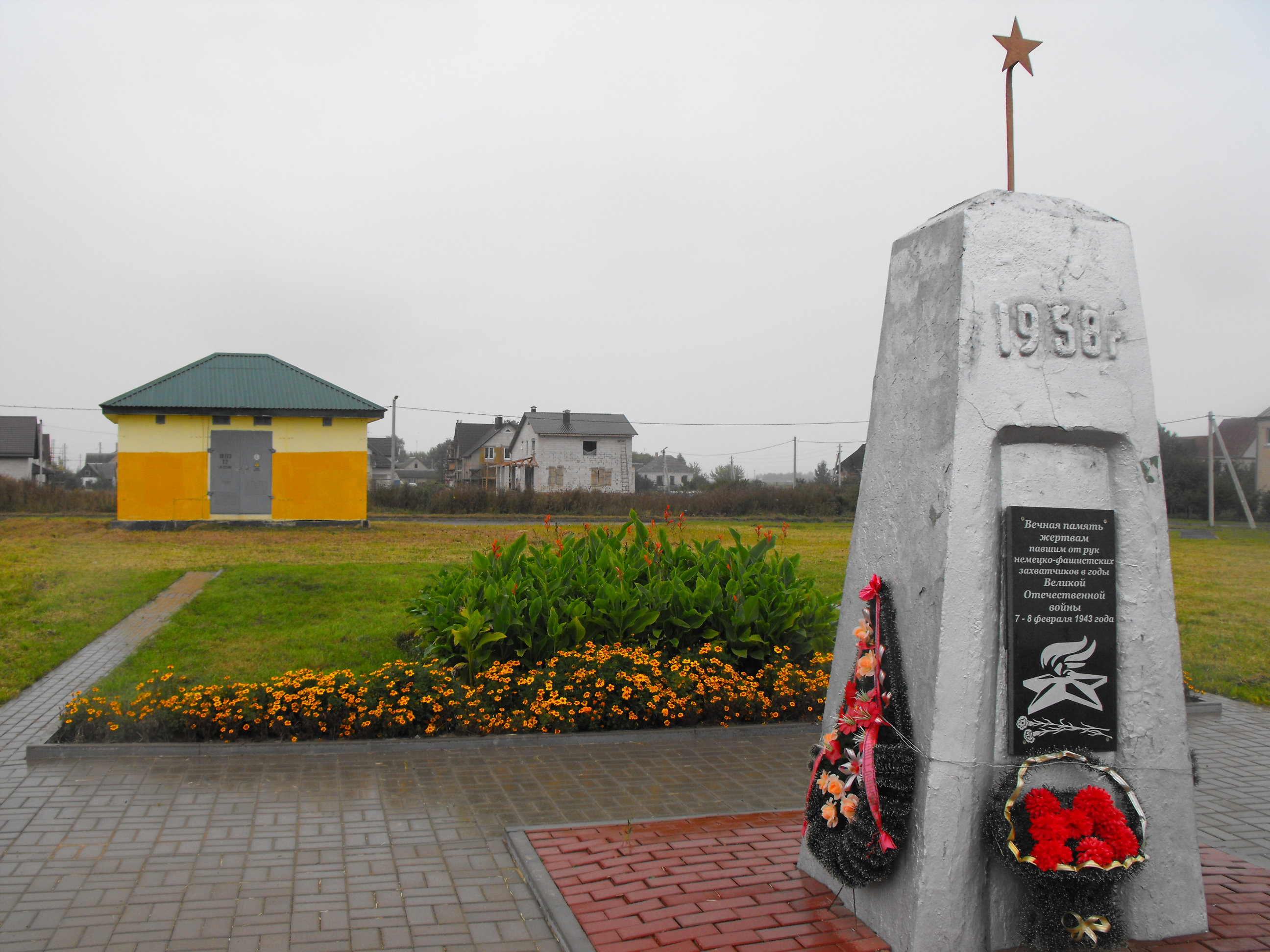 Памятник убитым евреям, узникам Слуцкого гетто, 7-8 февраля 1943 года. Расположен в Слуцке на улице Монахова.